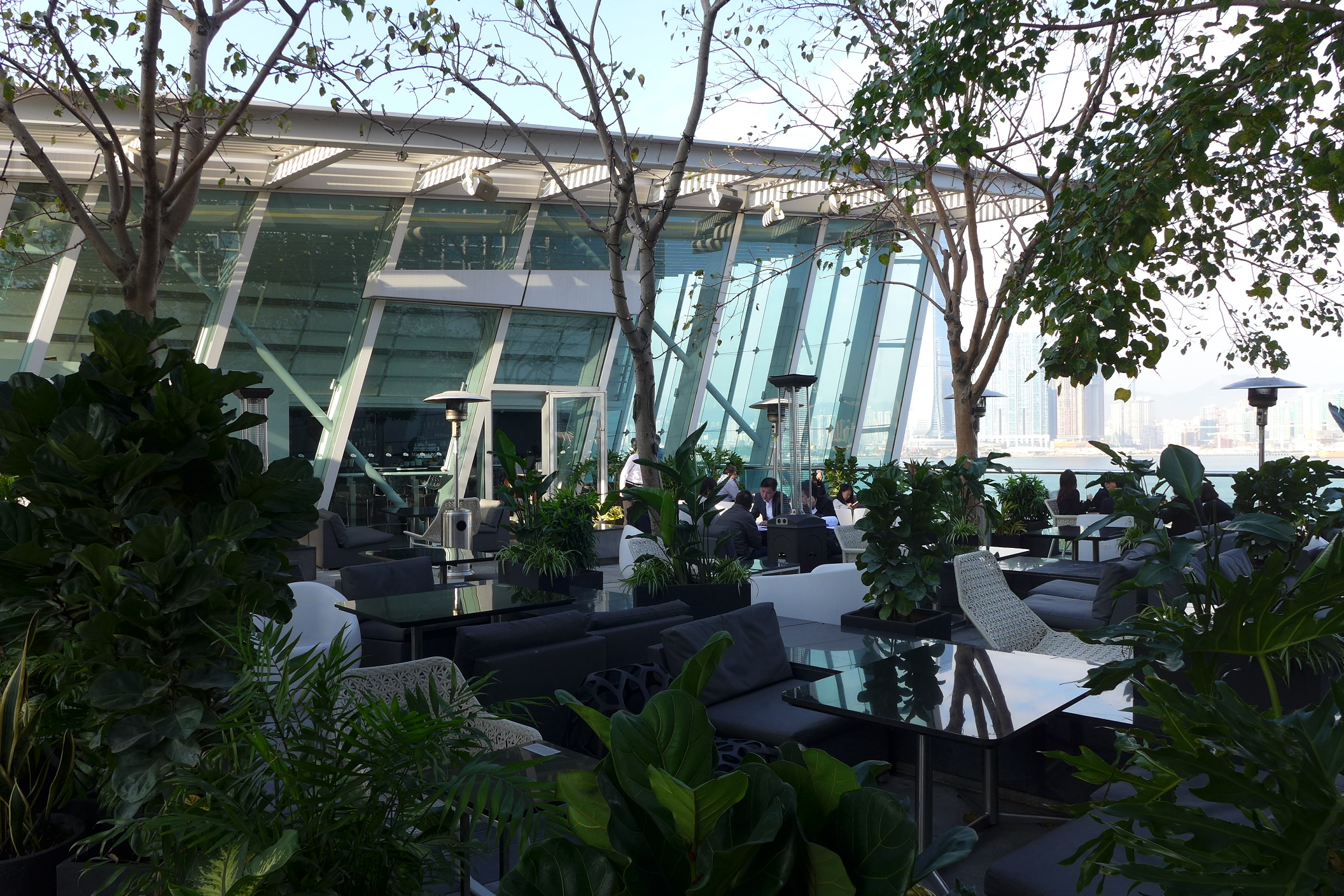 ifc mall Level 4 Restaurant seats